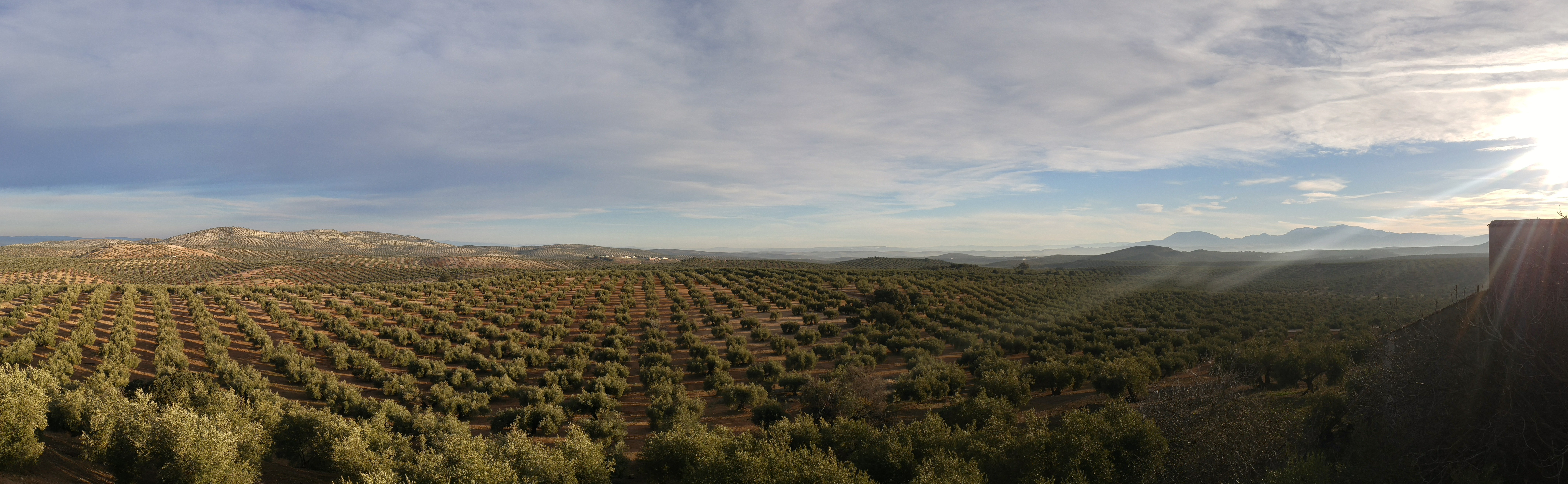 Vista panorámica de la campiña olivarera al norte de la ciudad de Jaén.